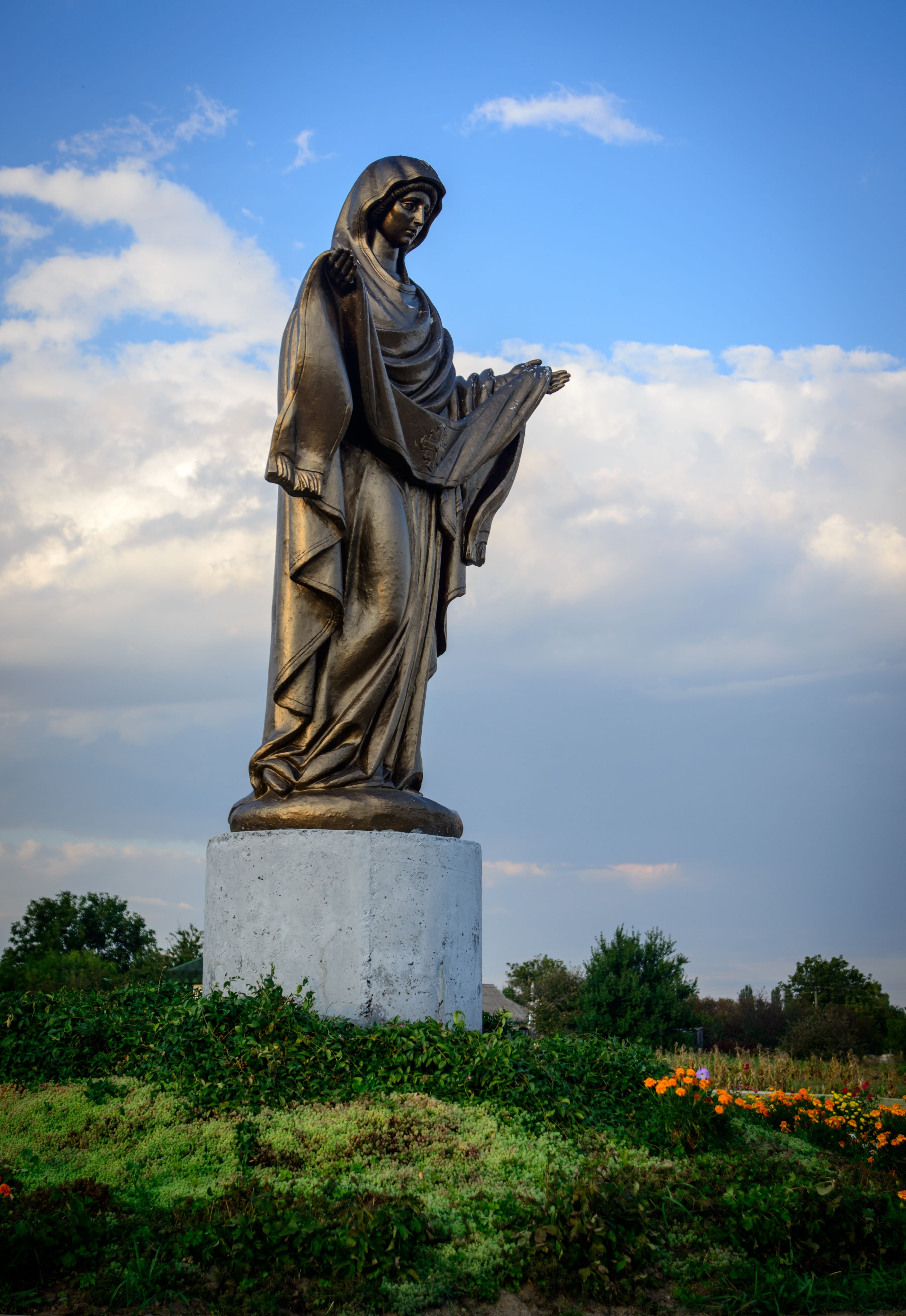 Меморіальний комплекс пам’яті загиблих козаків:, с. Жуки, центр